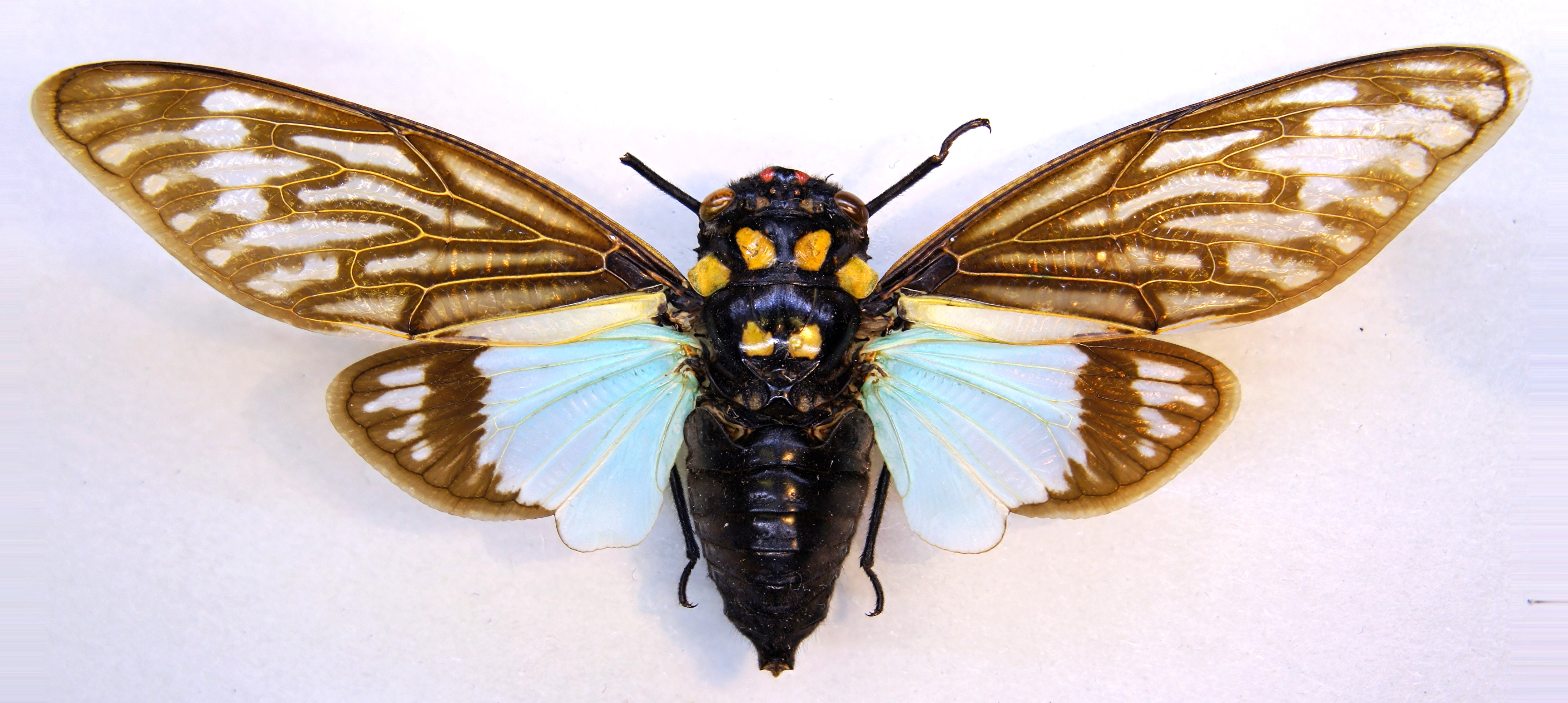 Tosena spendida (Distant, 1878) Herkunft: Thailand, Chiang Mai